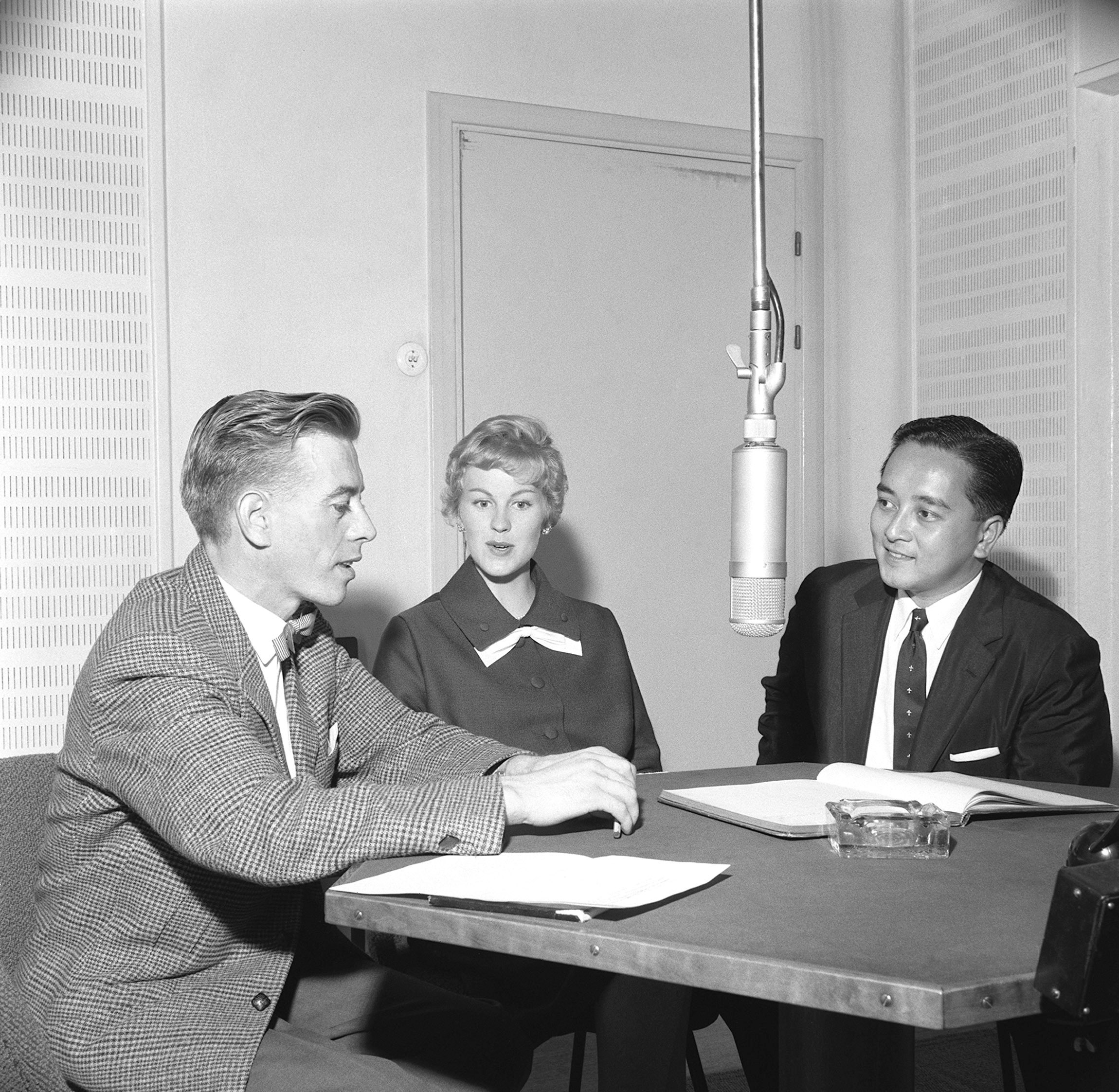 Yleisradion toimittaja Esko Tommola haastattelee radion studiossa Armi Hilariota (ent. Armi Kuusela) ja hänen aviomiestään Gil Hilariota. Tiedätkö jotain tästä kuvasta? Jätä kommentti tai ota yhteyttä sähköpostitse: Tutustu Ylen arkistosisältöihin: Fler skatter från Yles arkiv: More about Yle, the Finnish Broadcasting Company